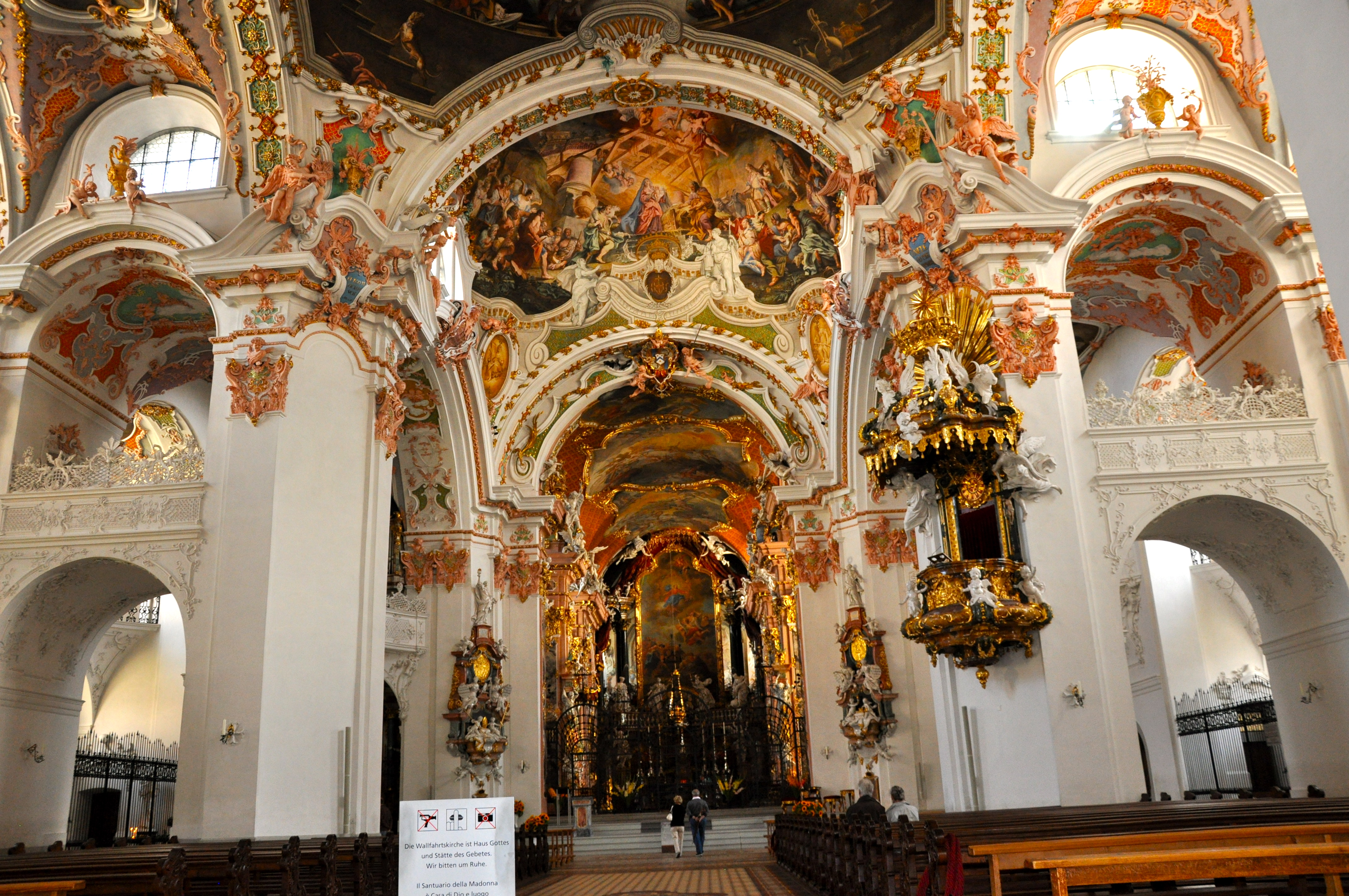 Vue Intérieure